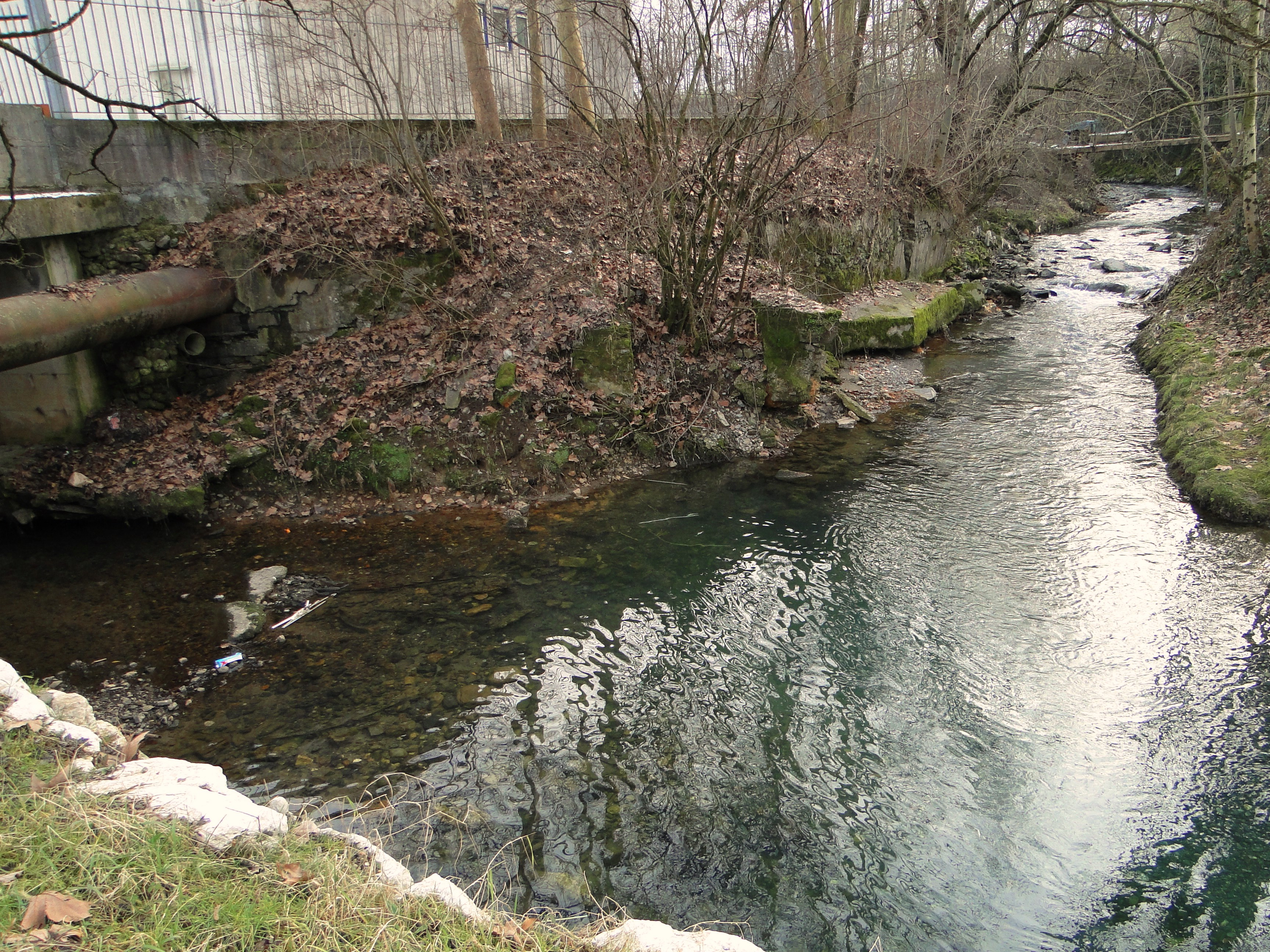 Confluenza tra il torrente Romna ed il tributario Re